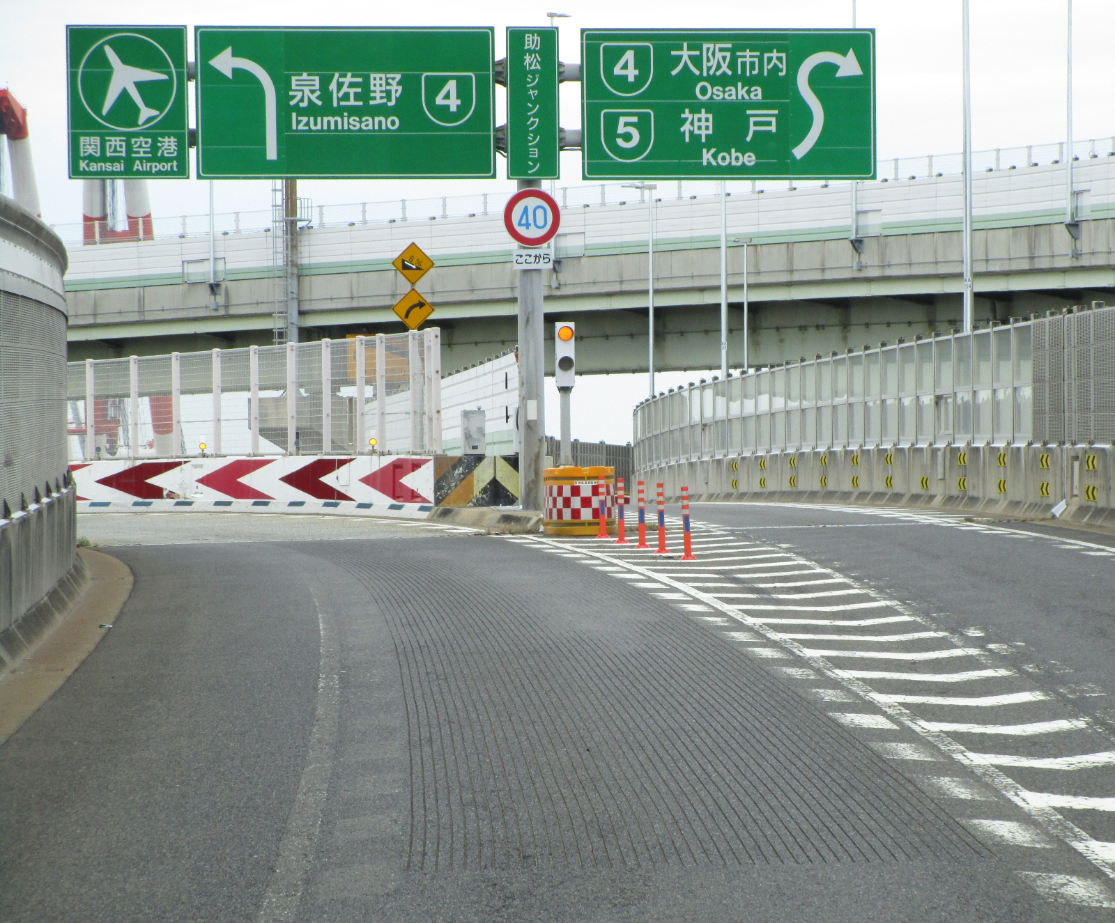 助松ジャンクション入口（堺泉北有料道路から阪神高速4号湾岸線方向への分岐点、車内より撮影）